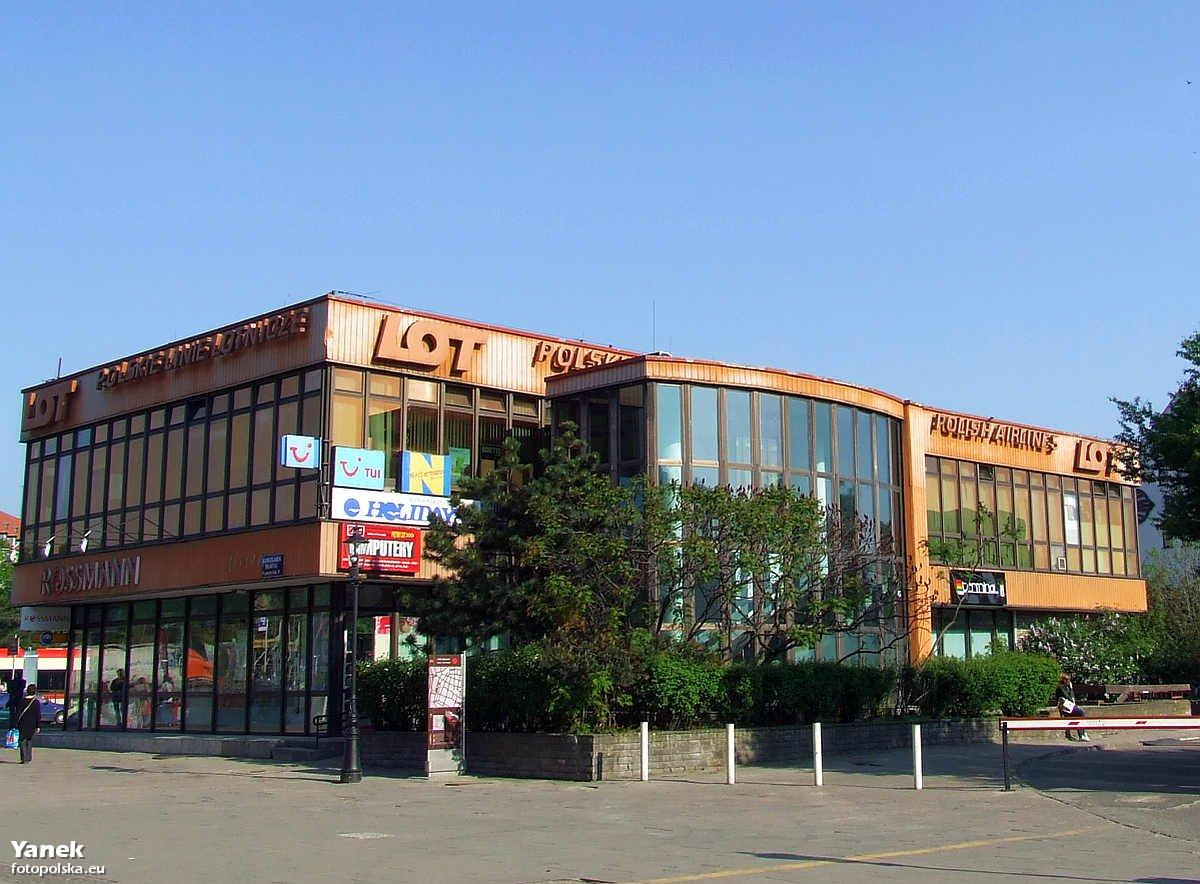 Dawny budynek LOT-u, widok od strony Katowni.